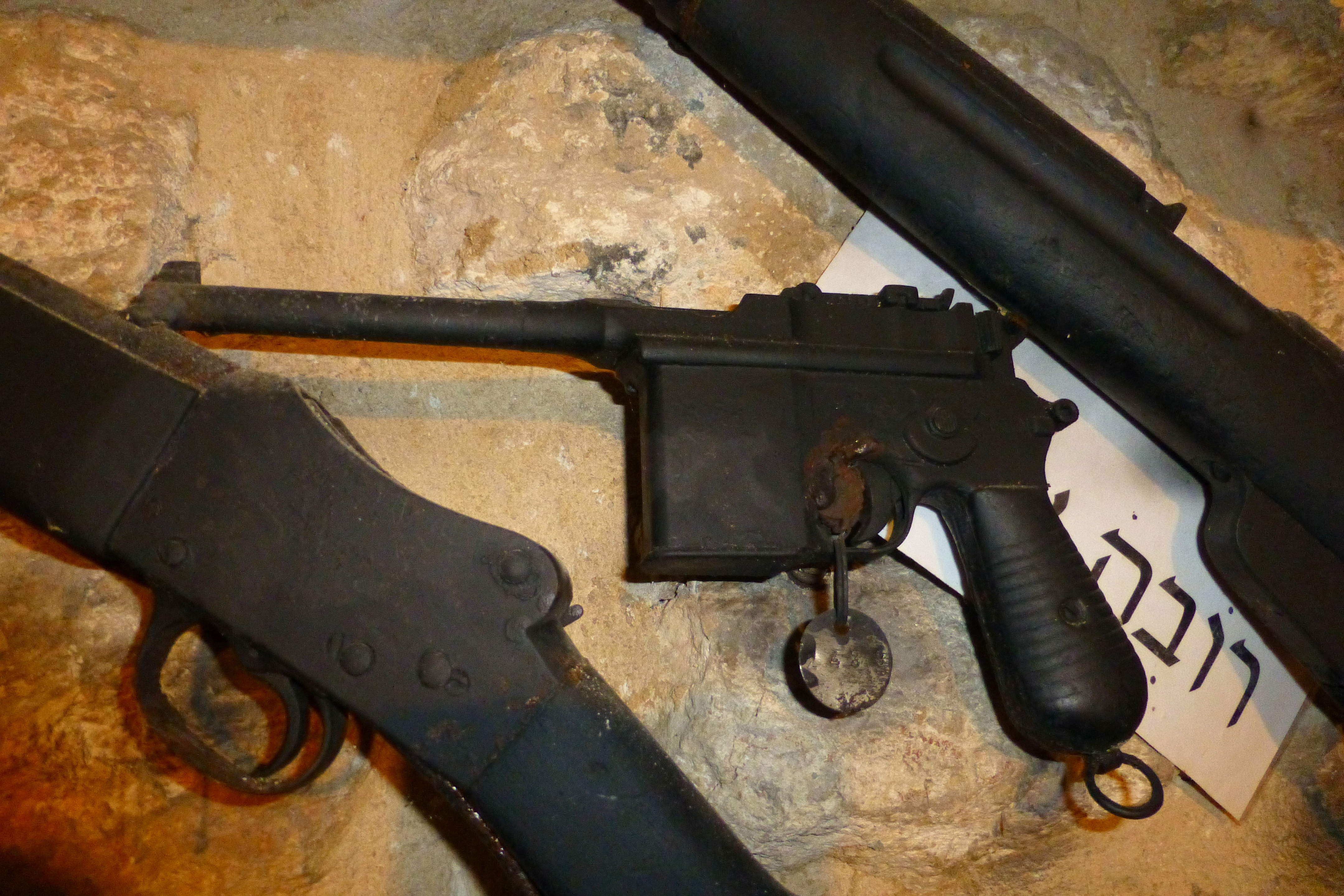 מערת הפלמ"ח במשמר העמק